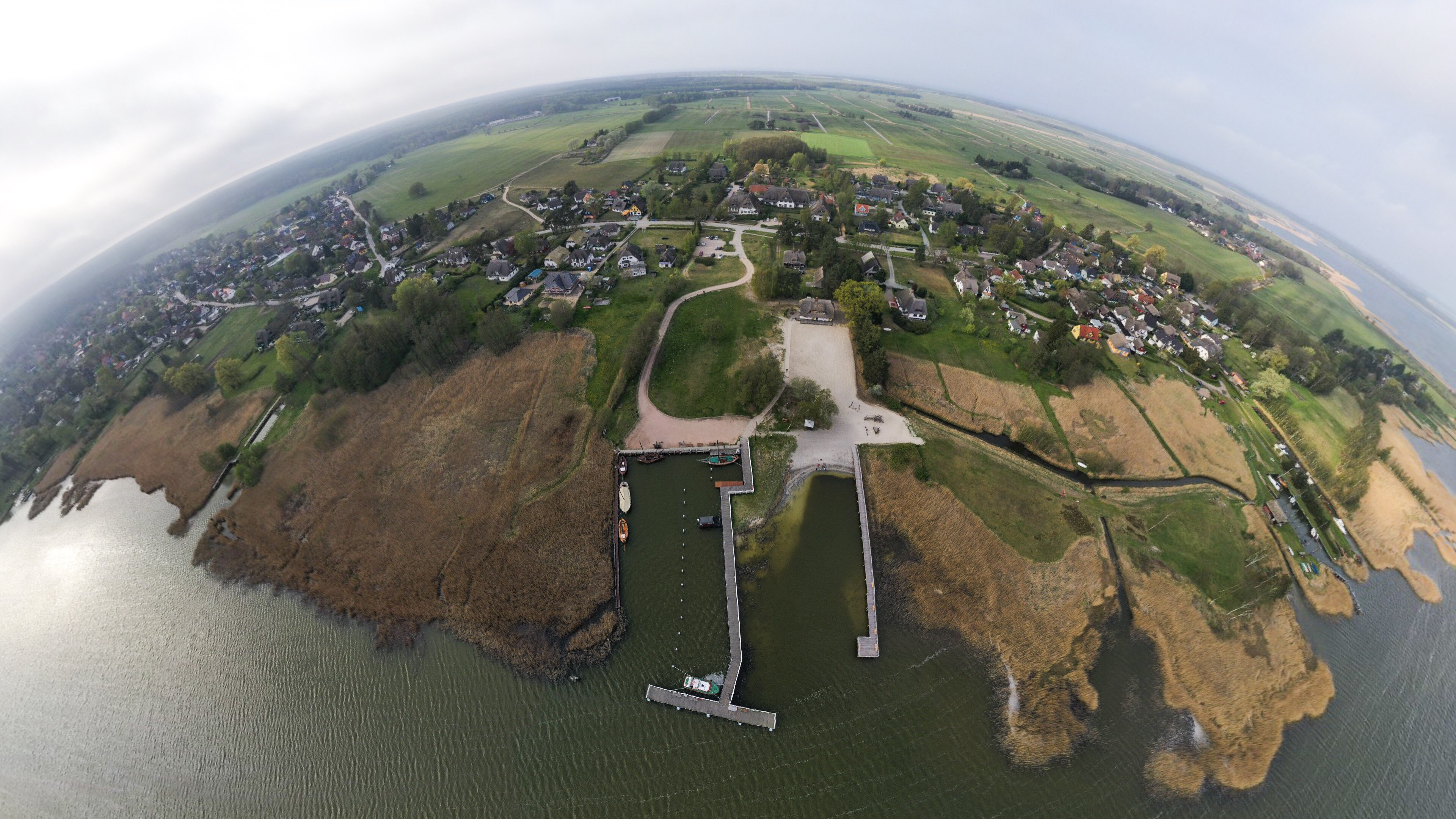 Wieck a. Darß – Weitwinkelaufnahme von oben